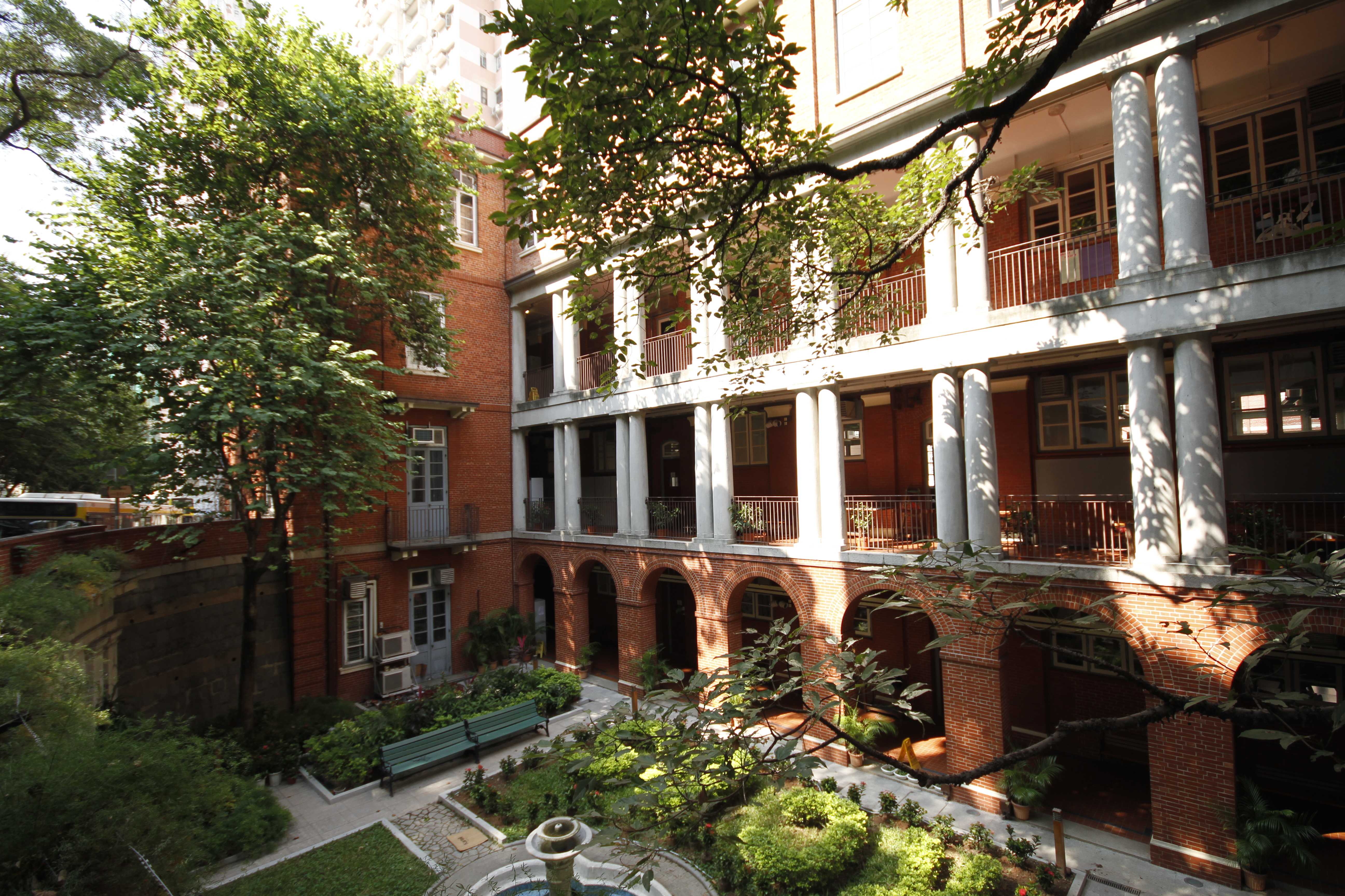 英皇書院